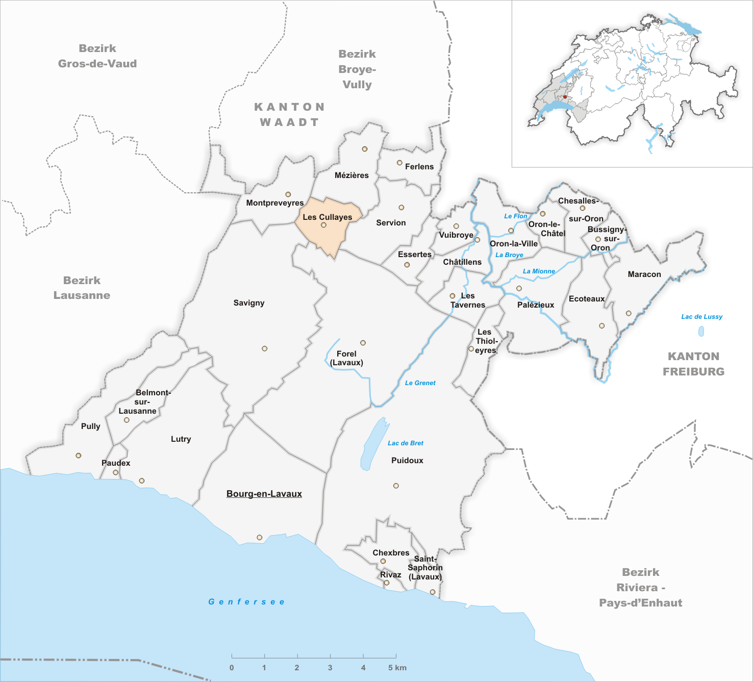 Municipality Les Cullayes